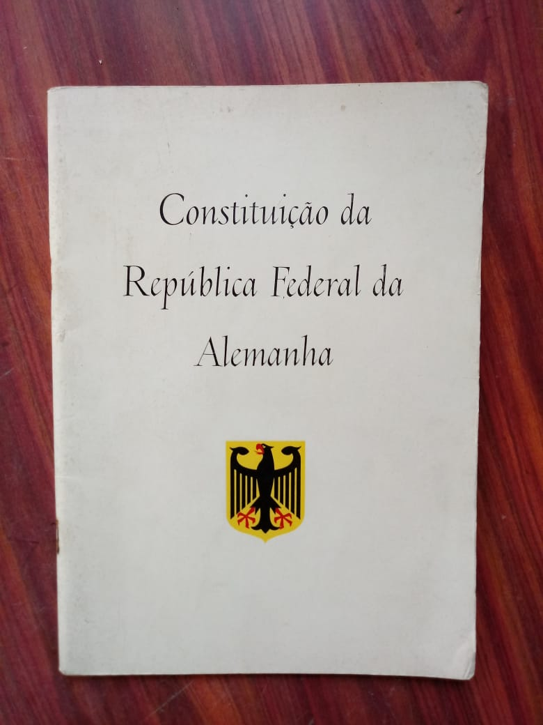 Exemplar em língua portuguesa da Lei Fundamental da República Federal da Alemanha de 1949. Feita pela embaixada da Alemanha no Brasil em 1961